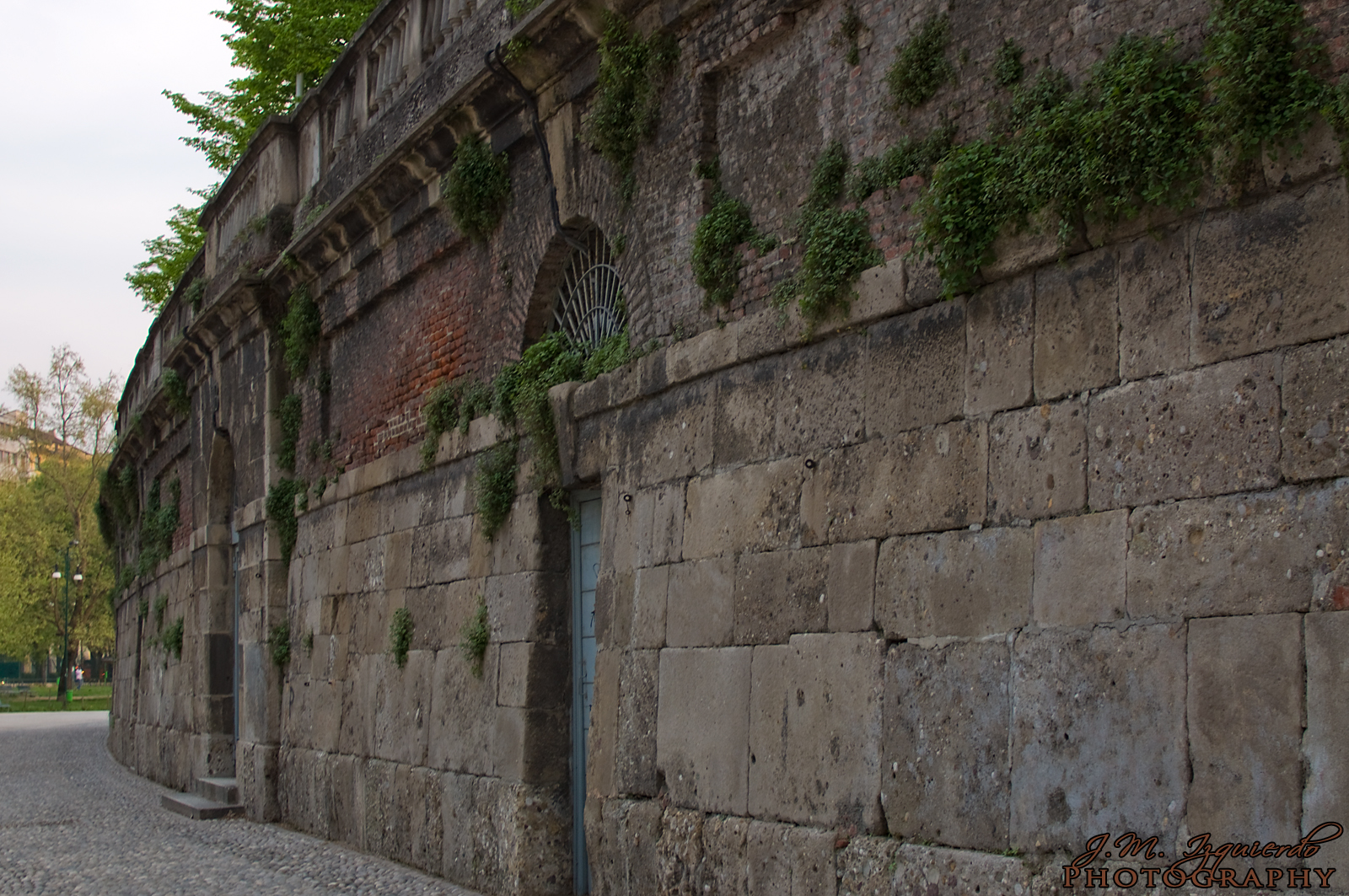 Nikon D90 + Nikkor AF-S 35 1.8G 1/20s - F/9 - 35mm - ISO200